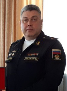 Заместитель командующего Тихоокеанским флотом контр-адмирал Денис Березовский во время встречи с офицерами ВМС и курсантами военных училищ Республики Корея